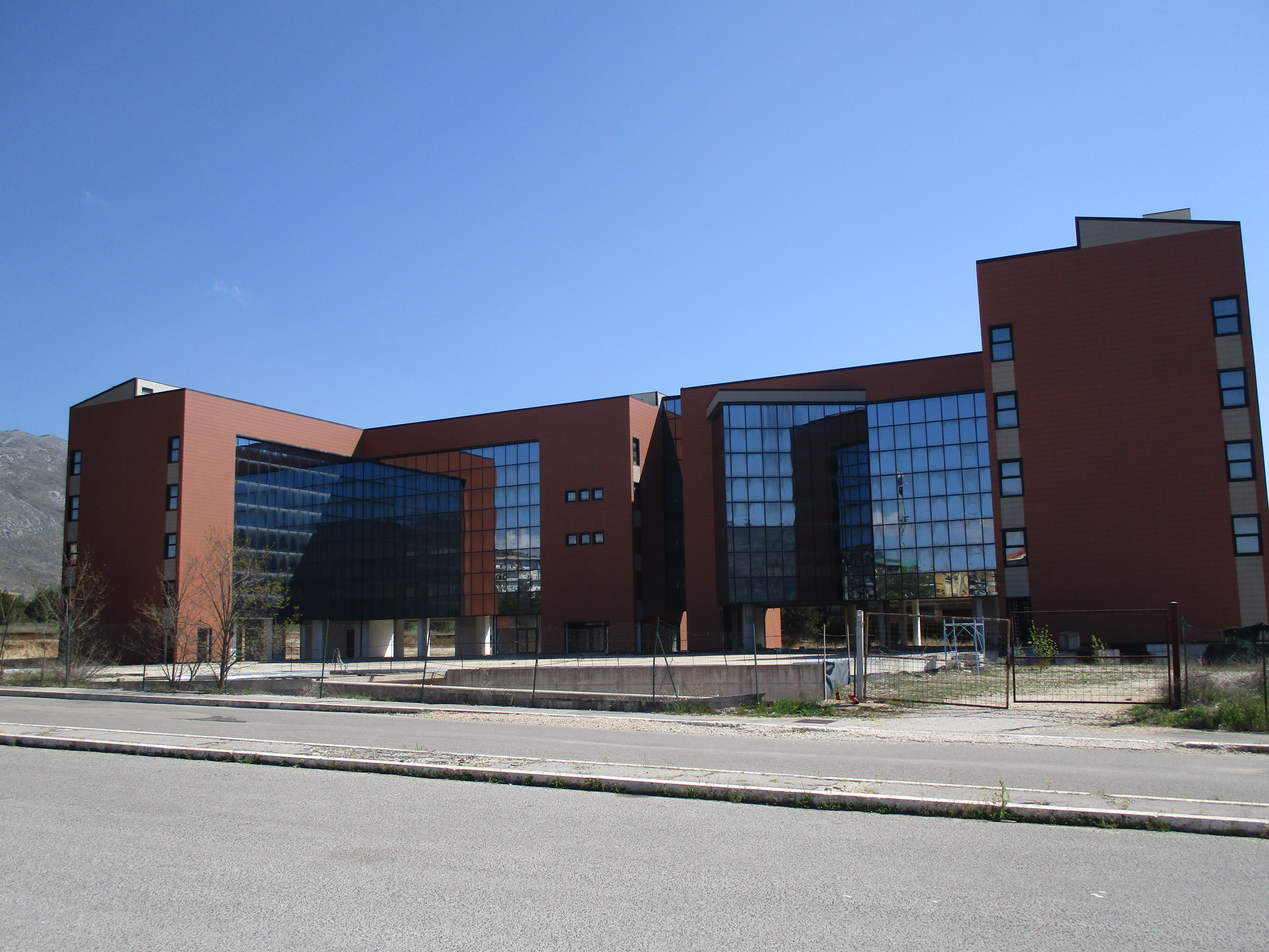 Nuovo municipio - area amministrativa